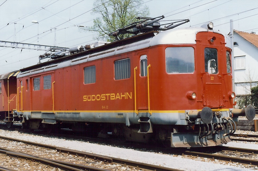 SOB De 4/4 Nr. 22, ex SBB RFe 4/4 603